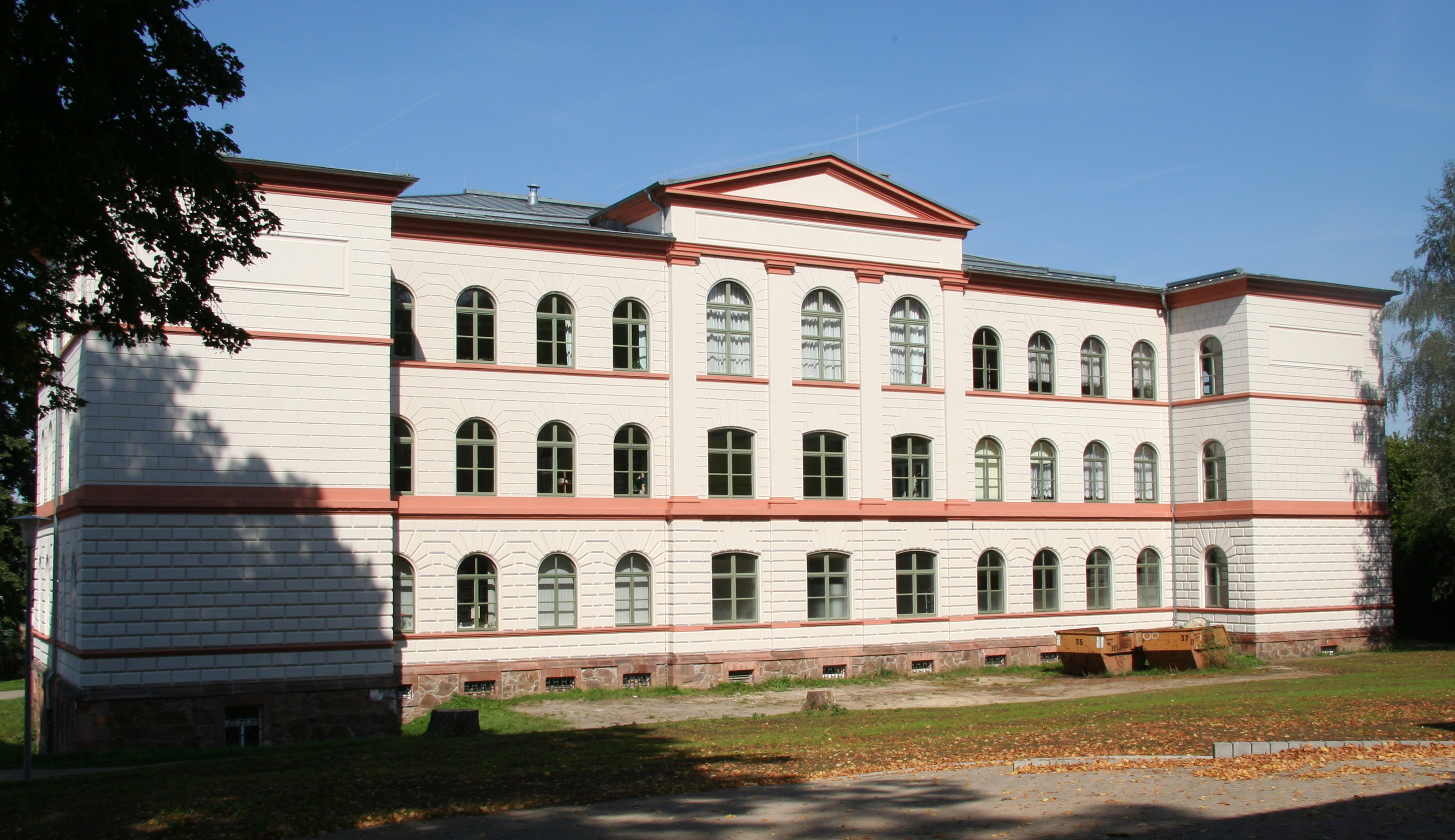 Schützenhausweg 4 in Penig, Gymnasium, graues Gebäude